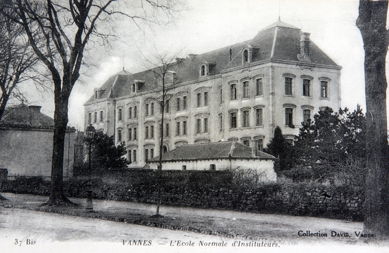 IUFM de Vannes - Carte postale des années 1890-1900